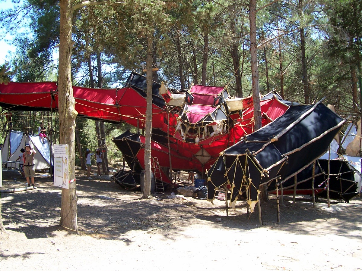 מבנה צופי של הנהגת צופי תל-אביב-יפו במחנה קיץ של תנועת הצופים העבריים בישראל